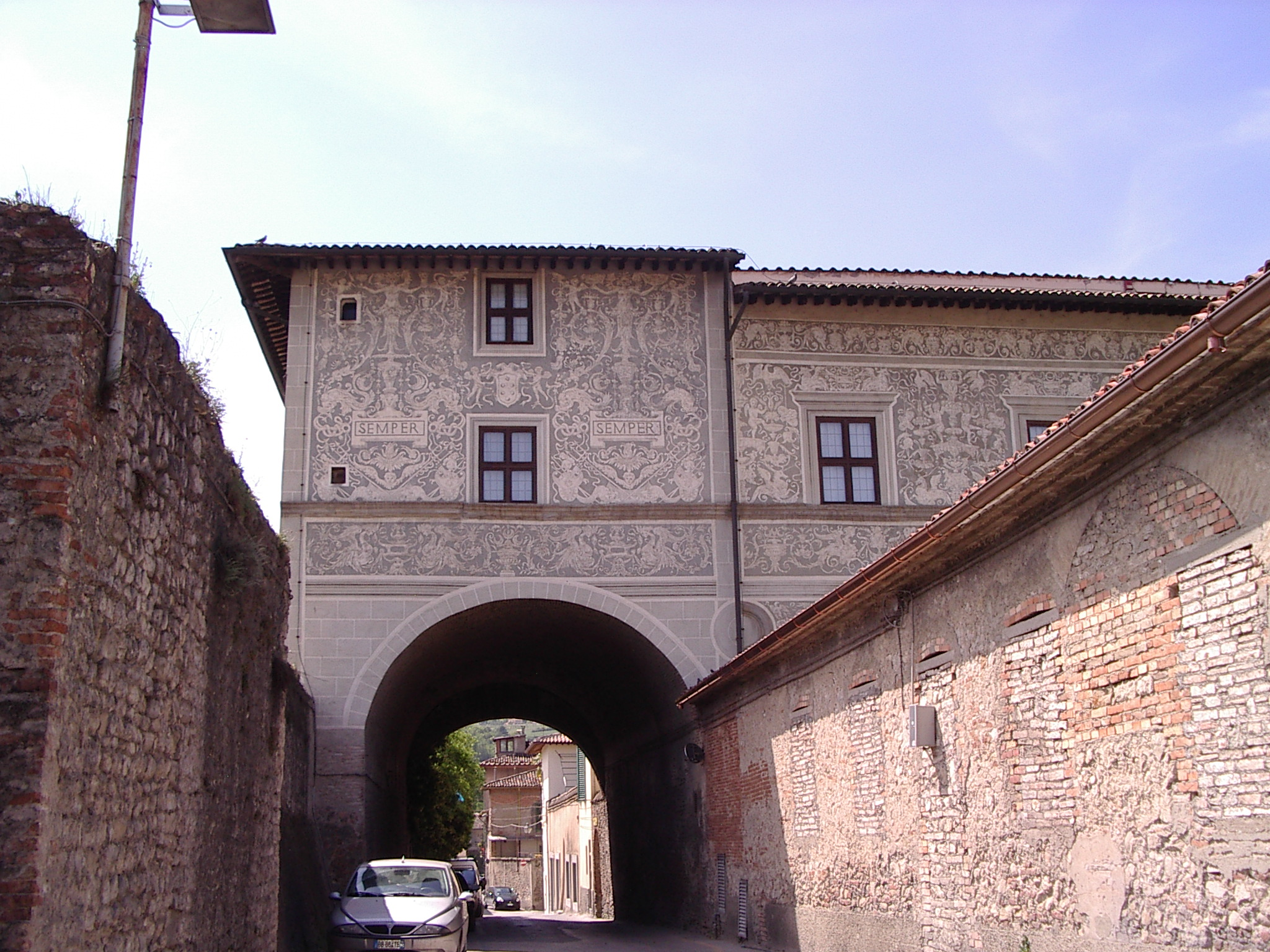 Città di Castello Pinacothèque La Cannoniera Ombrie Italy